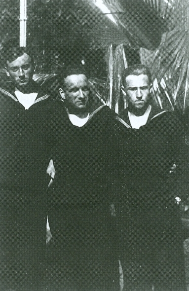 Gojenci jugoslavanske pomorske vojaške akademije od leve : Hrvoj Gregorin, Ivan Konte in Sergej Mašera.